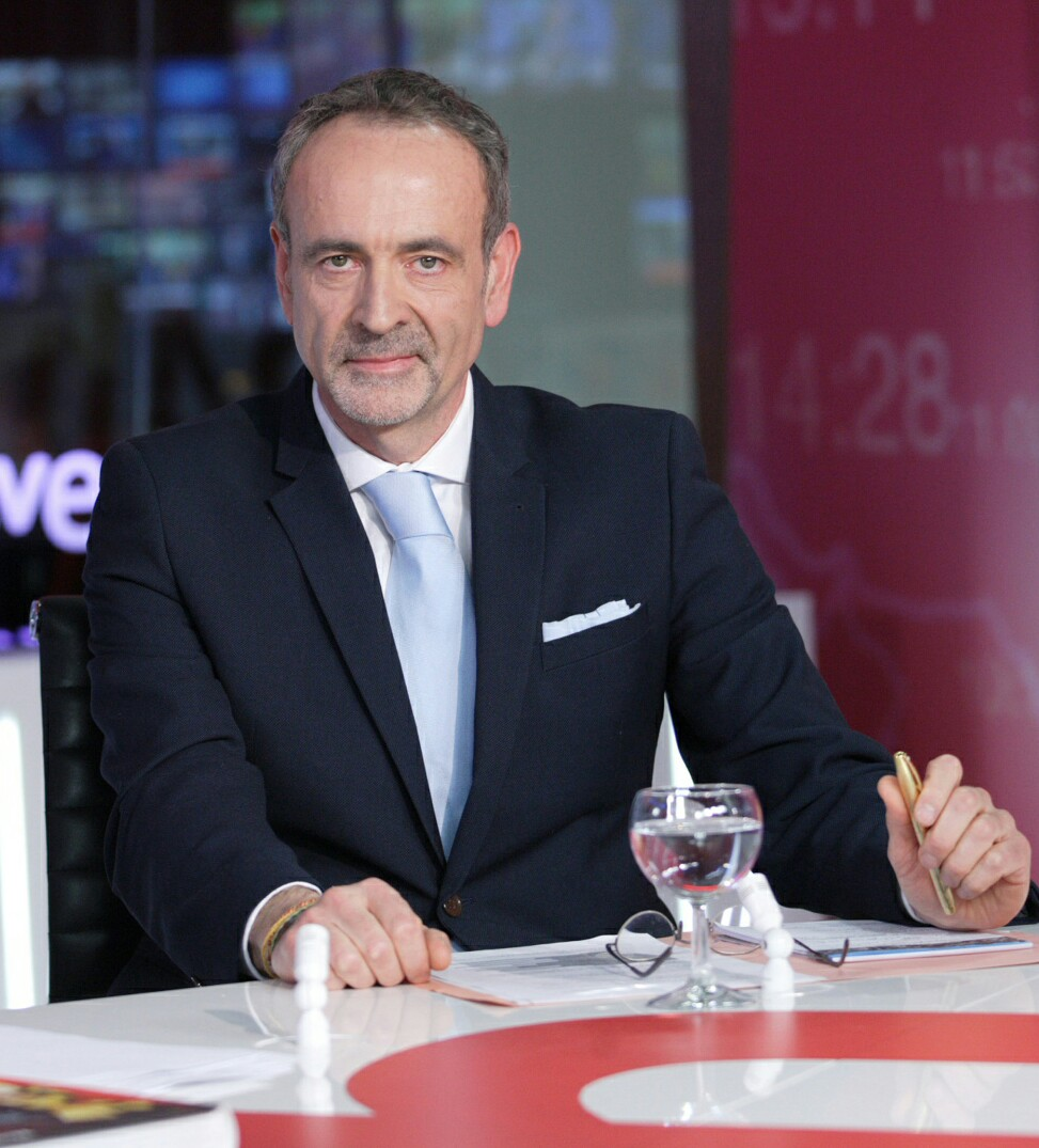 Albúm propio TV